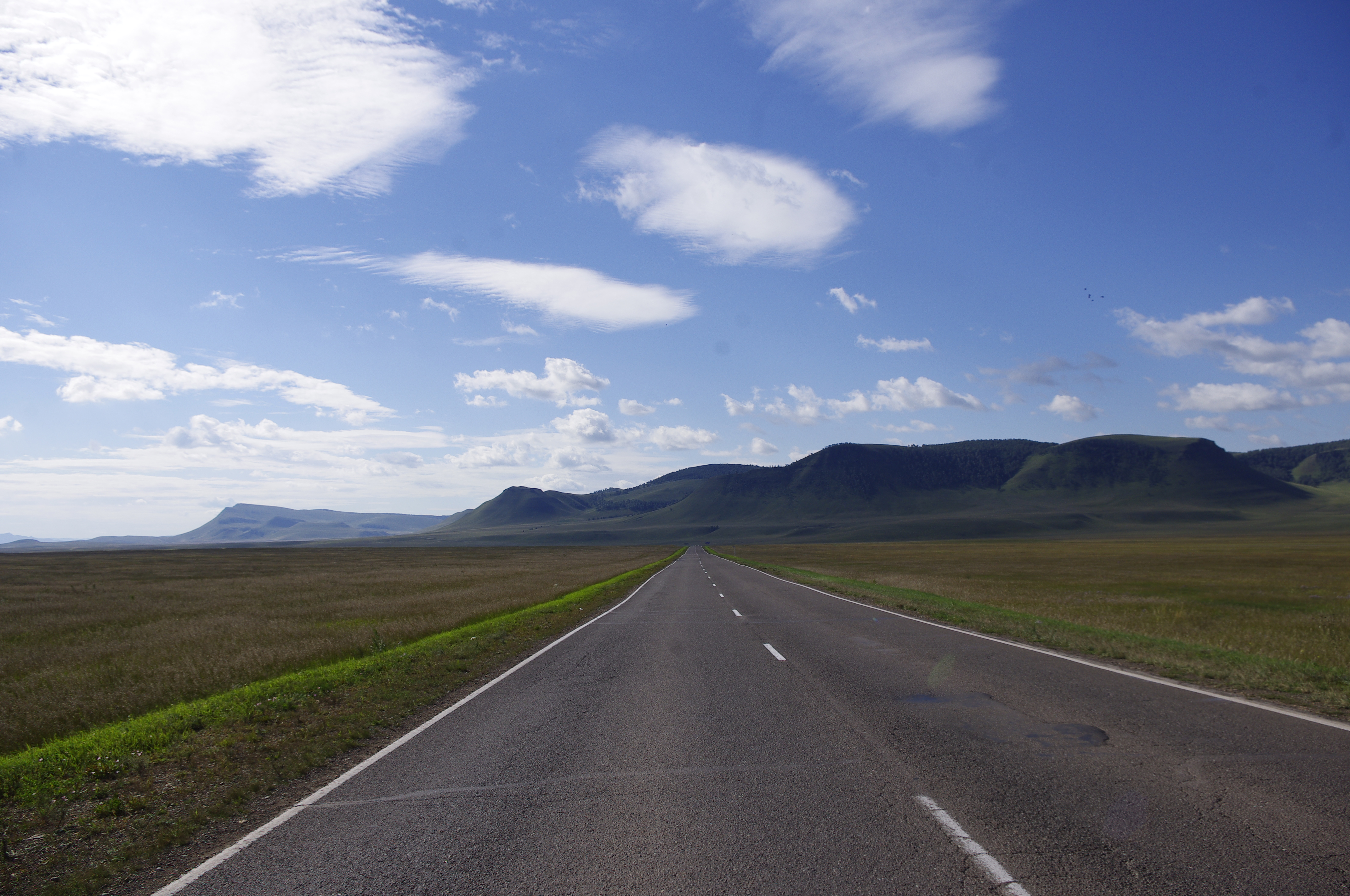 Lato 2013